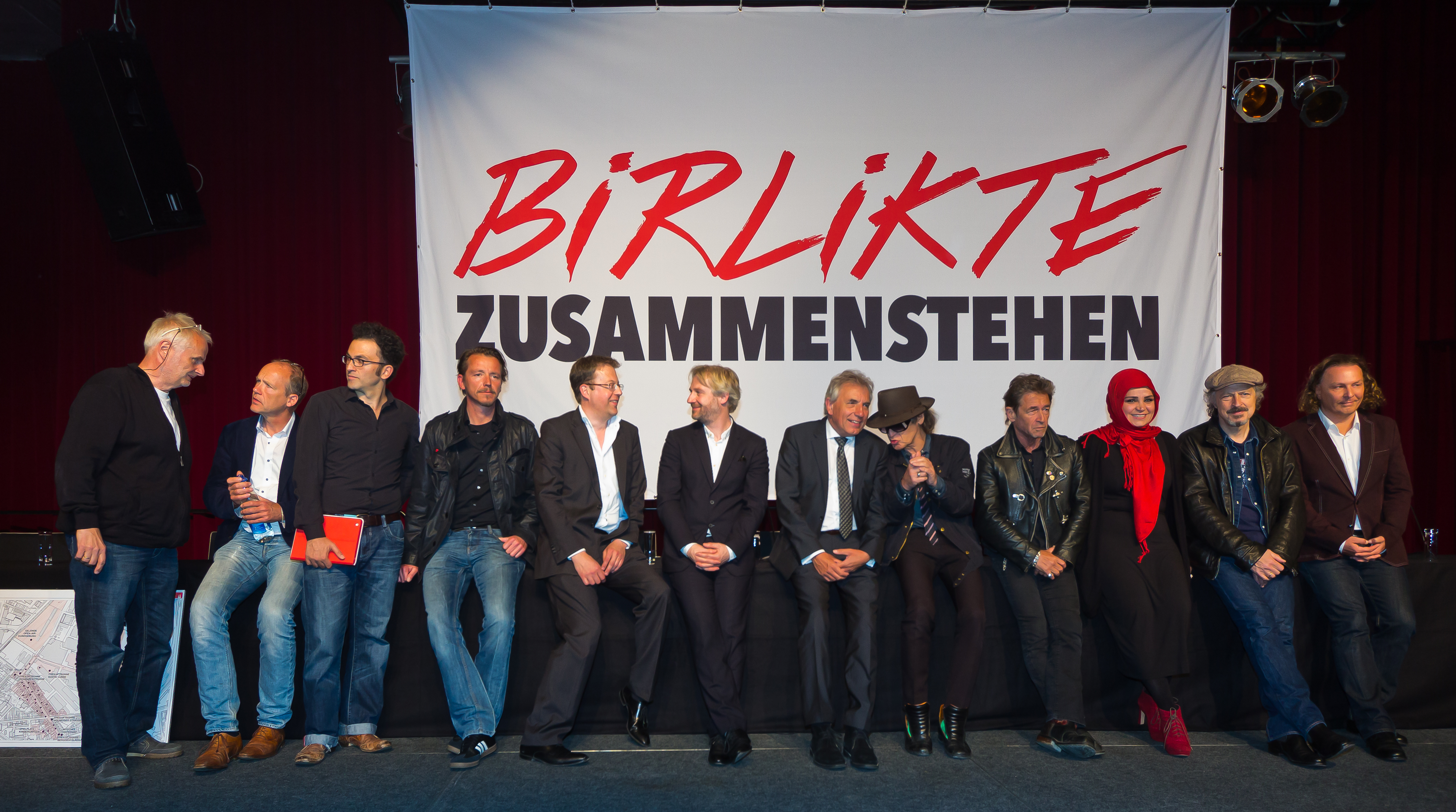 Pressekonferenz im E-Werk zum geplanten Kunst- und Kulturfest „Birlikte - 10 Jahre nach dem Nagelbombenanschlag in der Keupstraße“ am 9. Juni 2014.Mit: Udo Lindenberg, Peter Maffay, Wolfgang Niedecken sowie für das Aktionsbündnis »BIRLIKTE«: Jürgen Roters (Oberbürgermeister der Stadt Köln), Meral Șahin, Vorsitzende der IG Keupstraße Hermann Rheindorf (AG Arsch Huh e. V.), Stefan Bachmann (Intendant Schauspiel Köln), Roland Temme (RTK Konzertveranstaltungs GmbH), Dr. Dominik Wichmann (Chefredakteur stern), Moderation: Fatih Cevikkollu